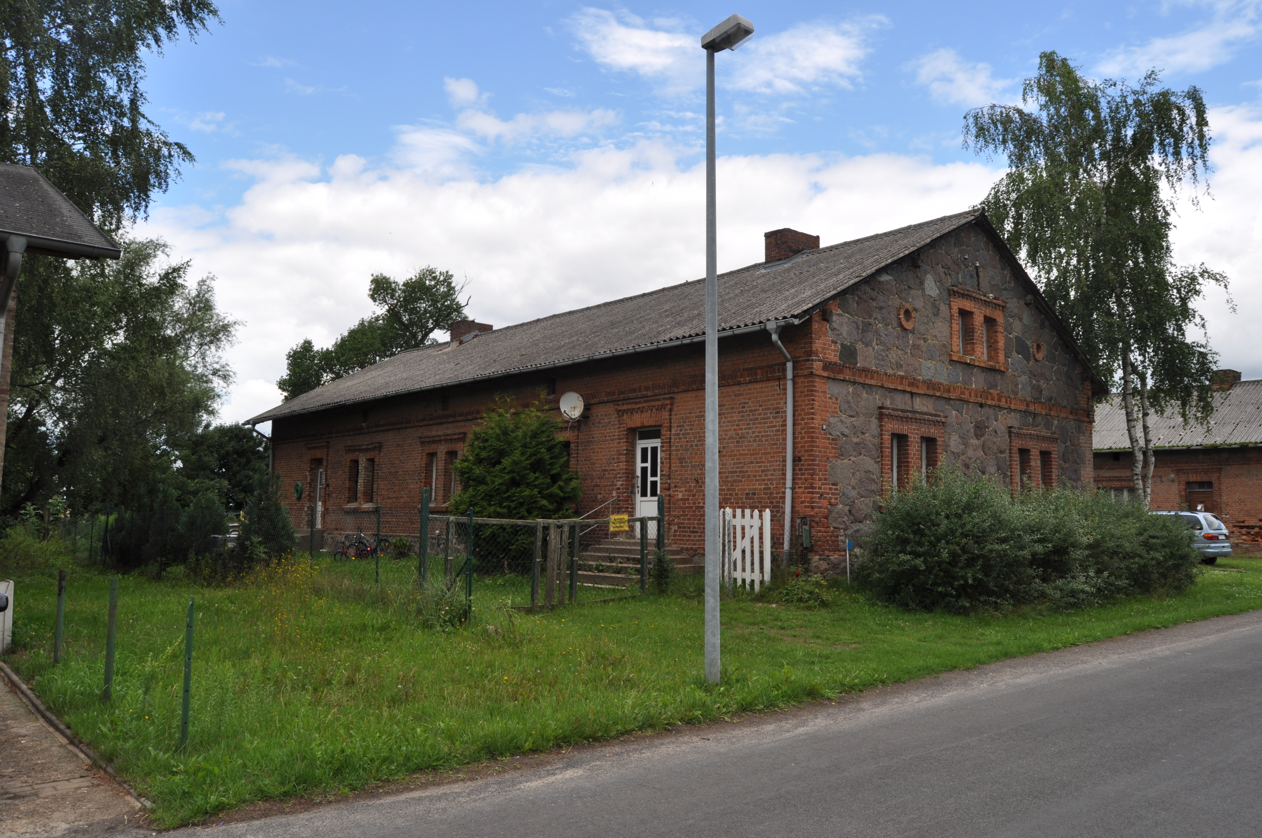 Landarbeiterhaus Dargezin